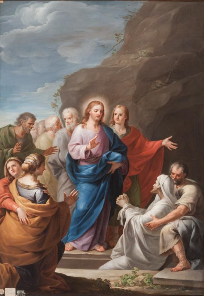 La obra representa la resurrección de Lázaro, que es uno de los milagros realizados por Jesucristo descritos en el Nuevo Testamento.